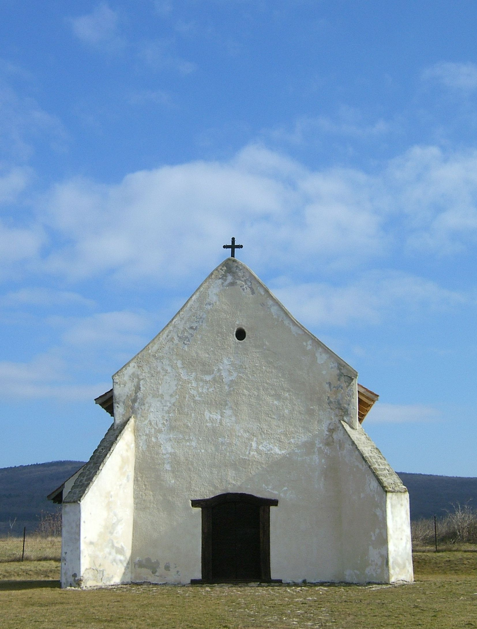 Budajenő temetőkápolnája (Pest megye, Magyarország) This is a photo of a monument in Hungary. Identifier: 6917